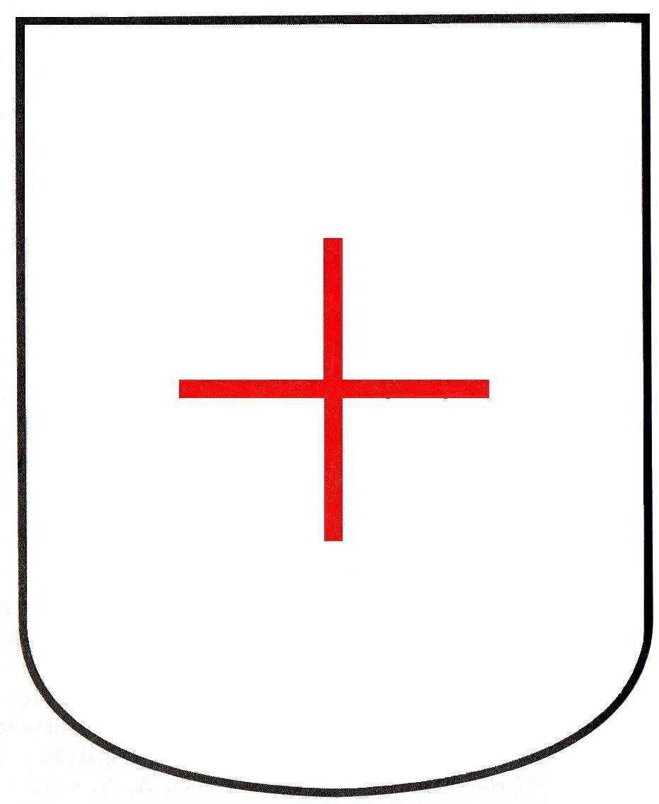 Escudo heráldico de la Orden de San Jorge de Alfama